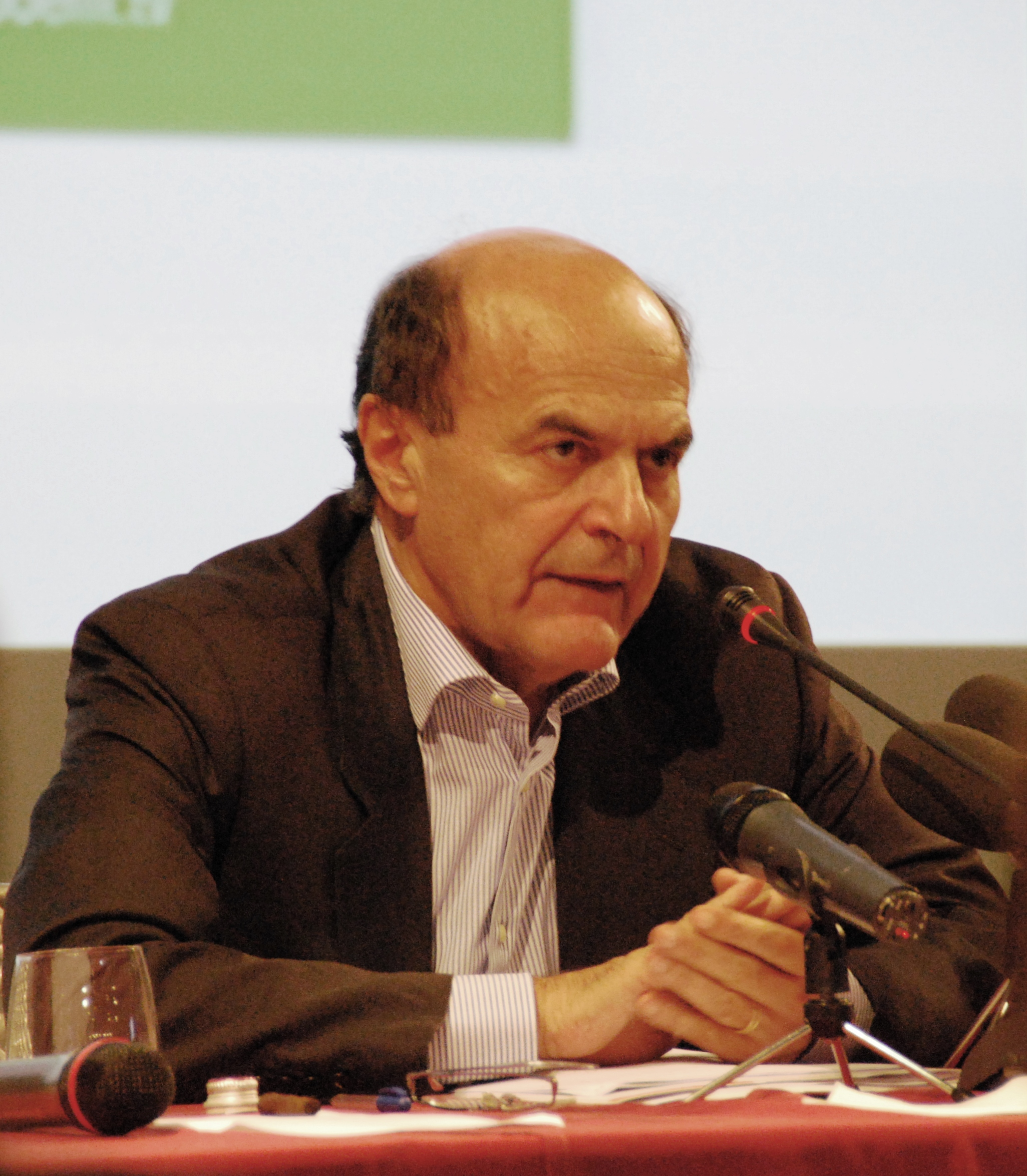 Pierluigi Bersani